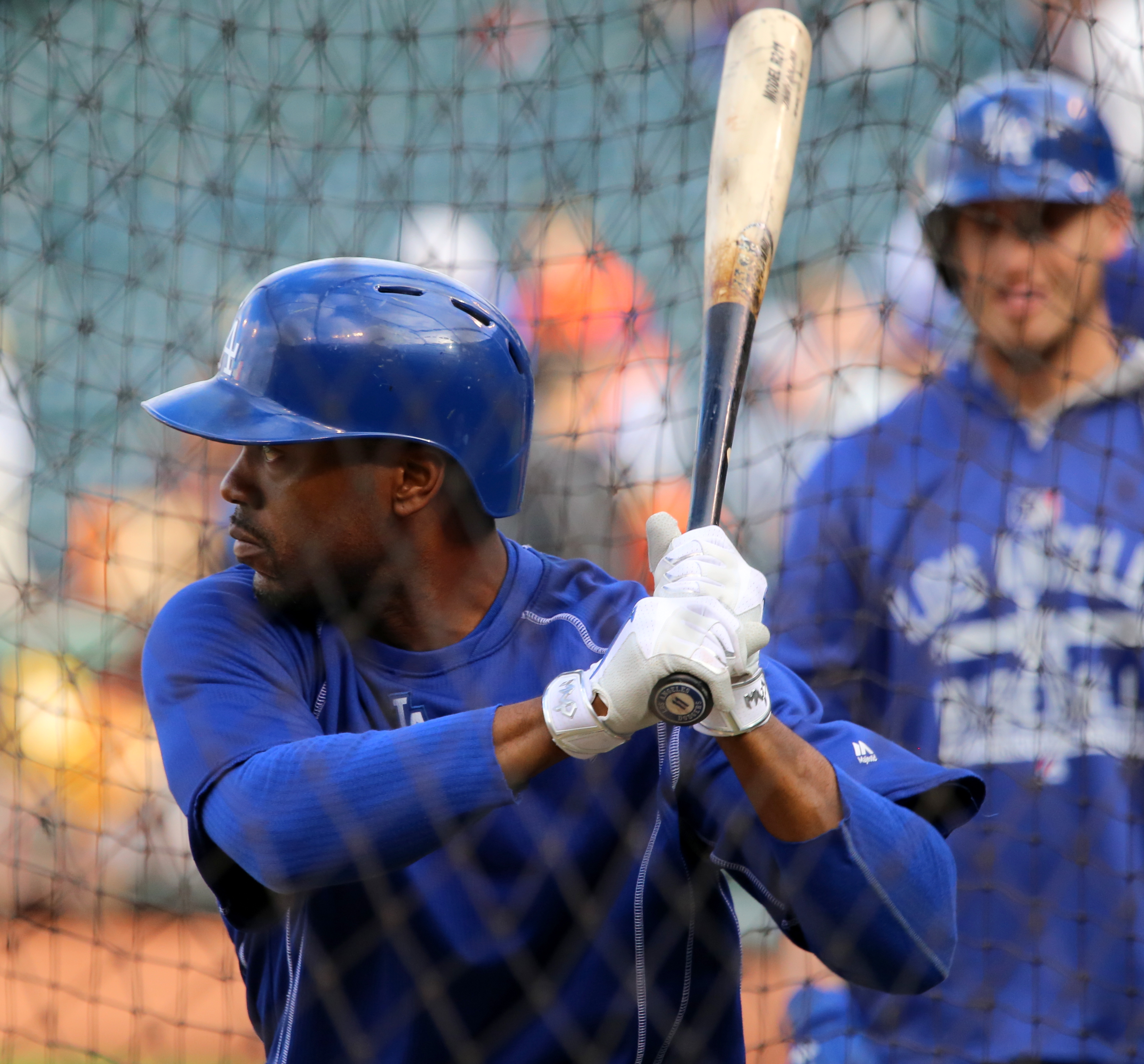 Jimmy Rollins